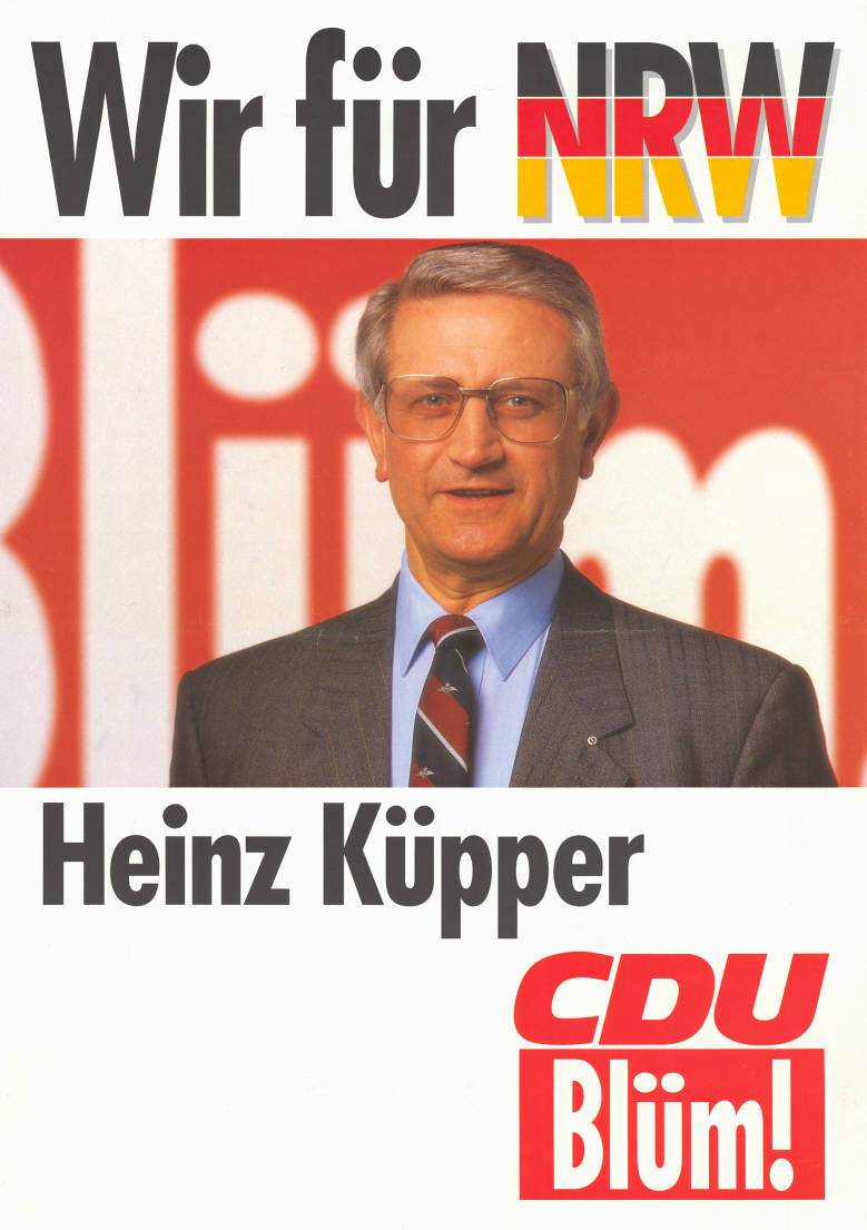 Wir für NRW Blüm Heinz Küpper CDU Blüm! Abbildung: Porträtfoto - Nationalfarben Plakatart: Kandidaten-/Personenplakat mit Porträt Objekt-Signatur: 10-009 : 1111 Bestand: Landtagswahlplakate Nordrhein-Westfalen (10-009) GliederungBestand10-18: Landtagswahlplakate Nordrhein-Westfalen (10-009) » CDU Lizenz: KAS/ACDP 10-009 : 1111 CC-BY-SA 3.0 DE